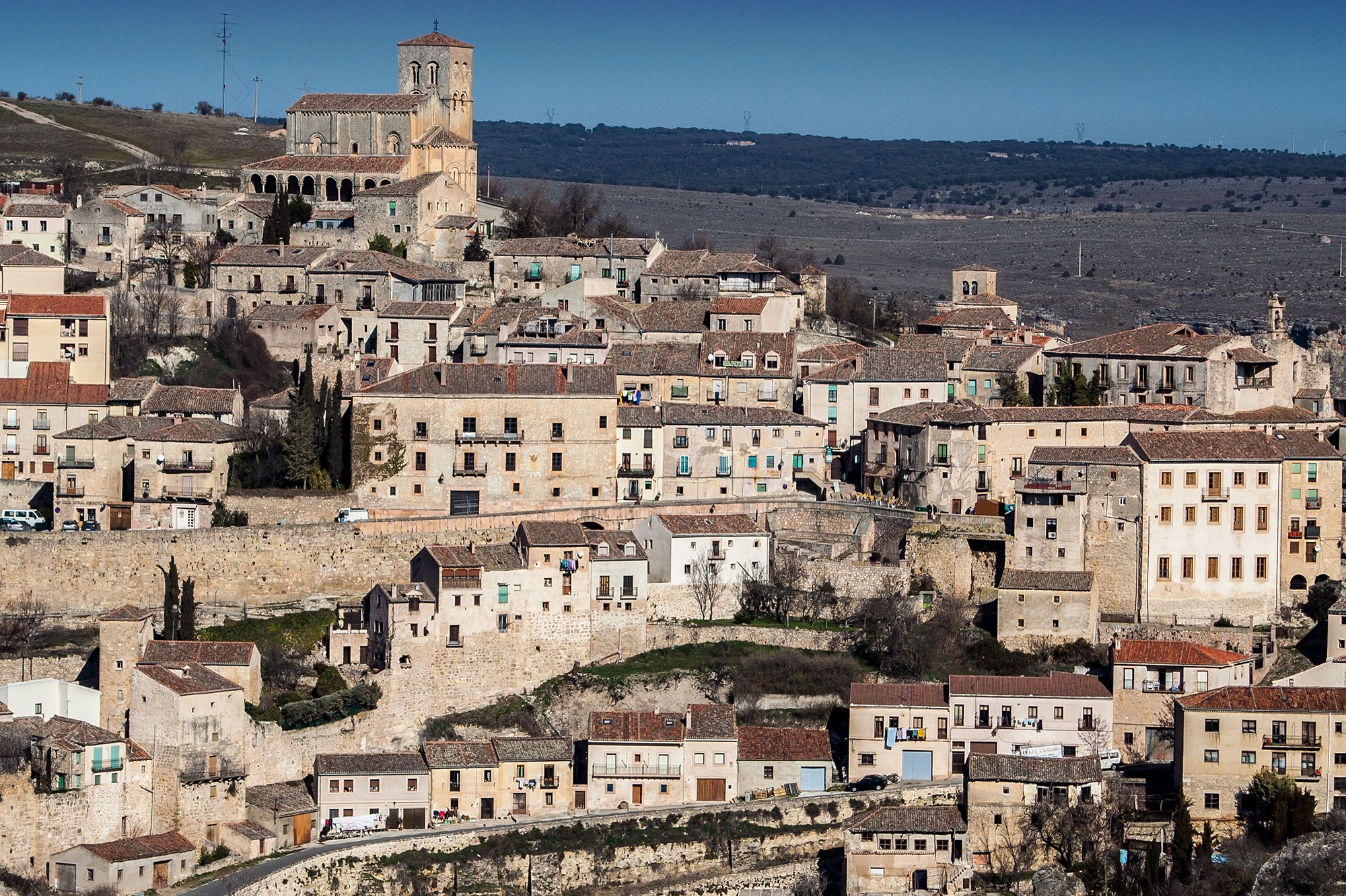 Sepúlveda, Segovia, España.